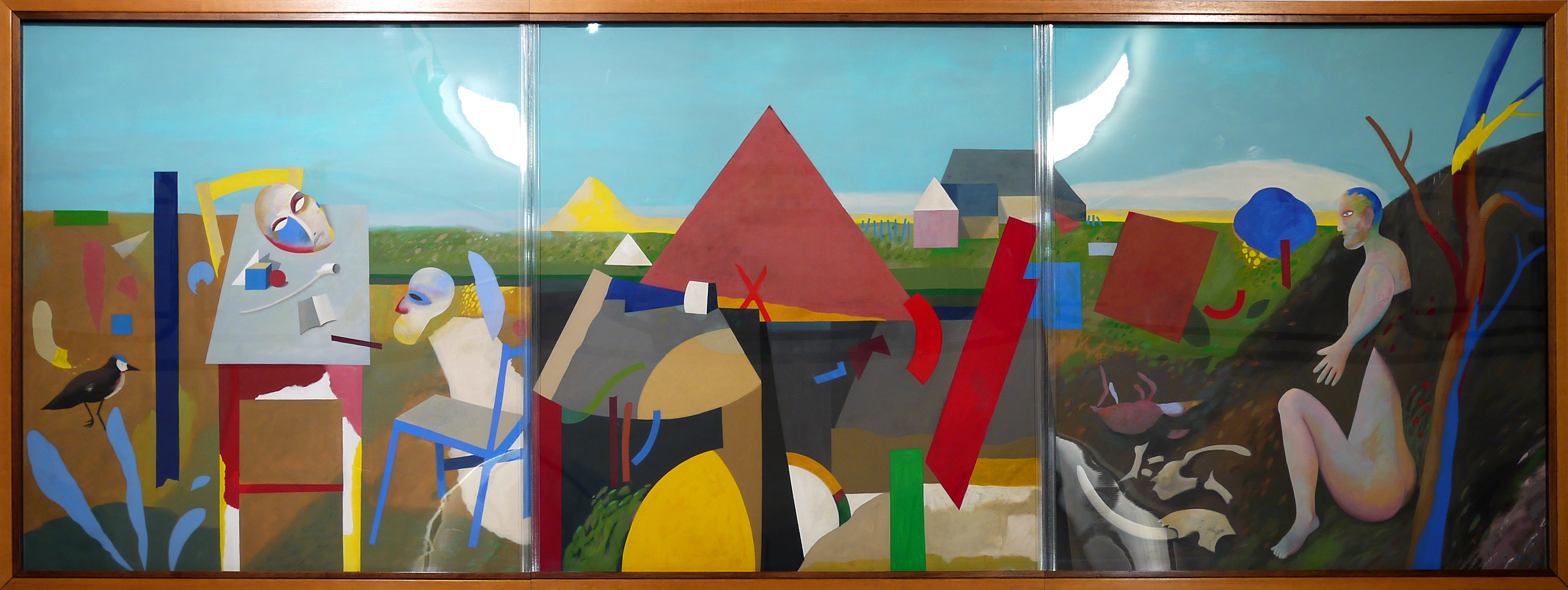 Kunst am Bau